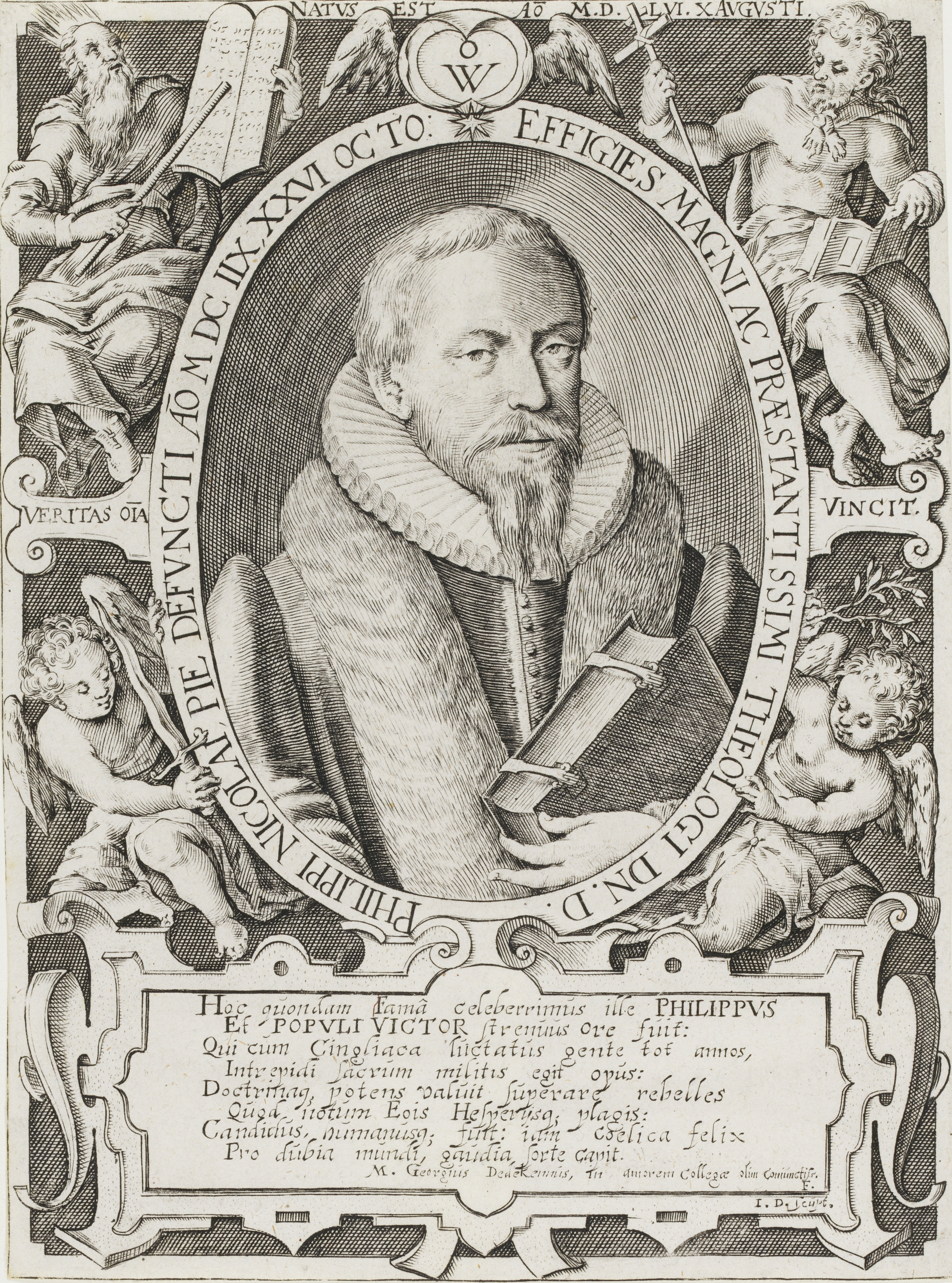 Bildnis von Philipp Nicolai